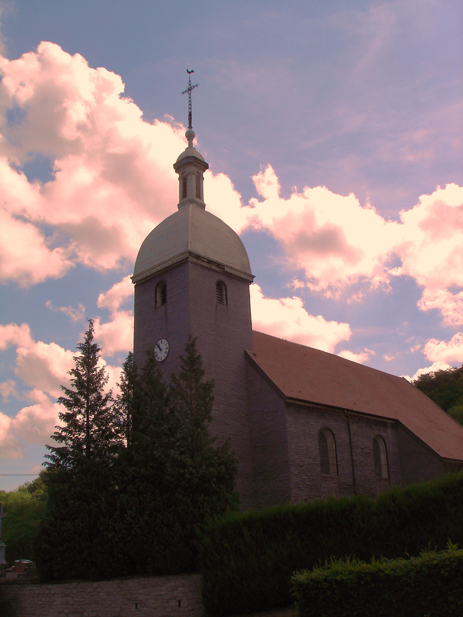 Église Saint-Maurice à Gonsans (Doubs) .